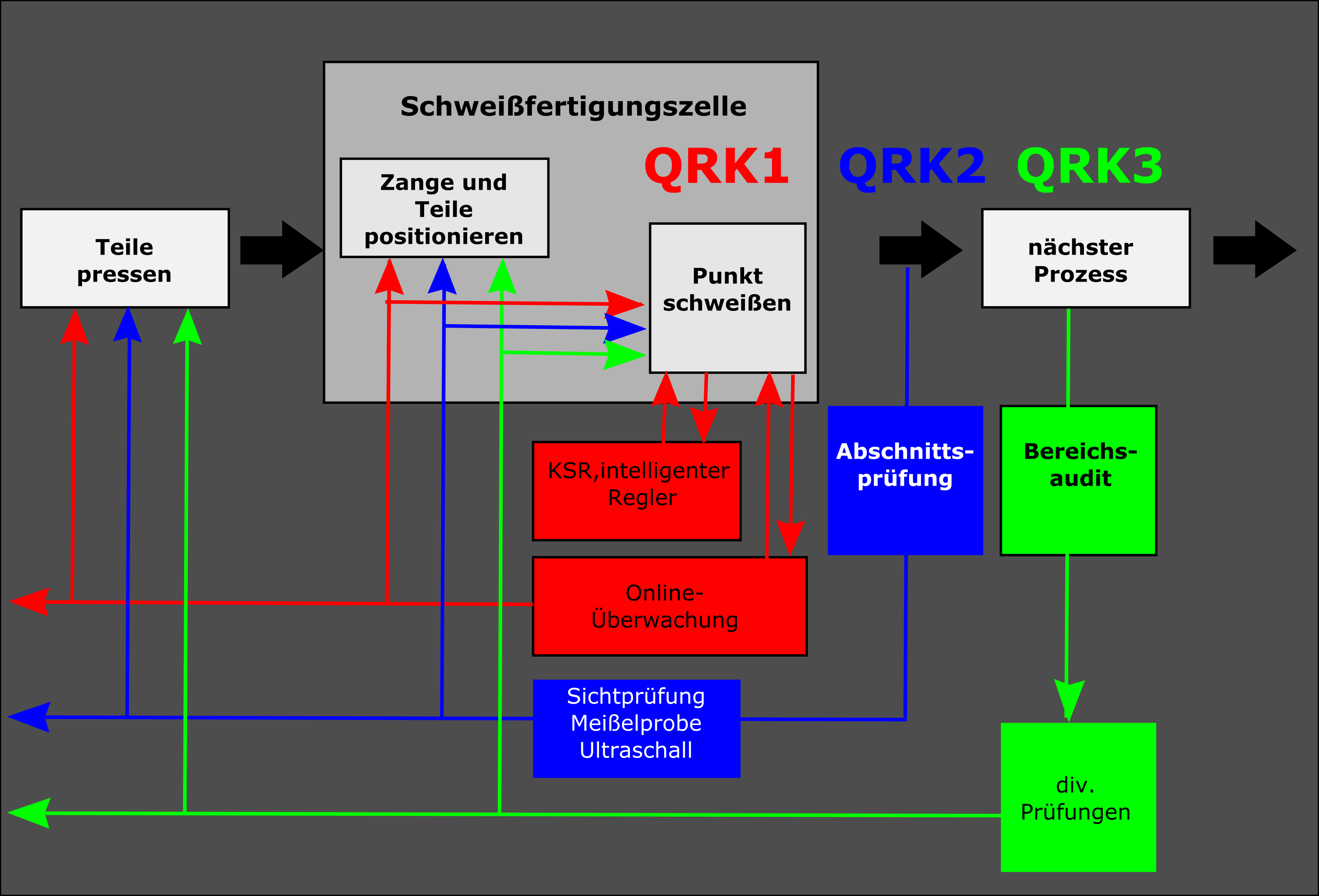 Qualitätsregelkreise beim Wderstandspunktschweißen